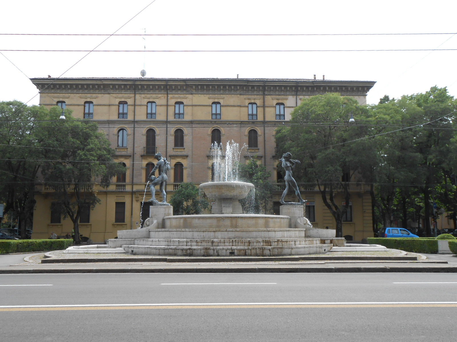 Fontana dei due fiumi This is a photo of a monument which is part of cultural heritage of Italy.